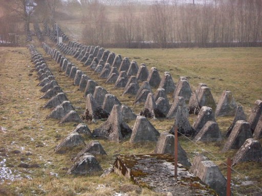 Panzersperre "Toblerone" Standort: Gurmels, Fribourg, Schweiz